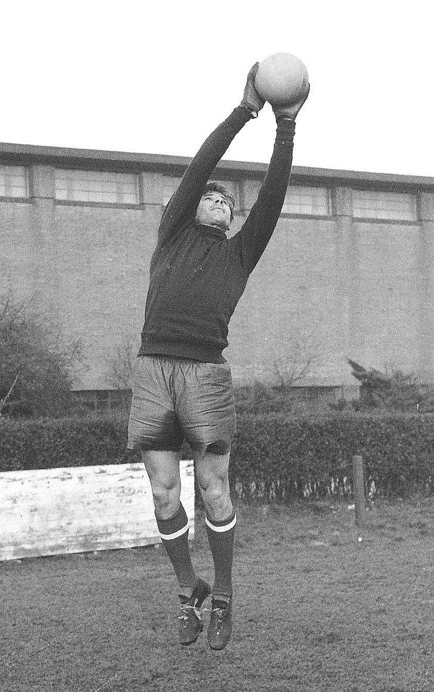 Russische voetballers training voor de wedstrijd tegen Feyenoord, keeper Yashin in actie